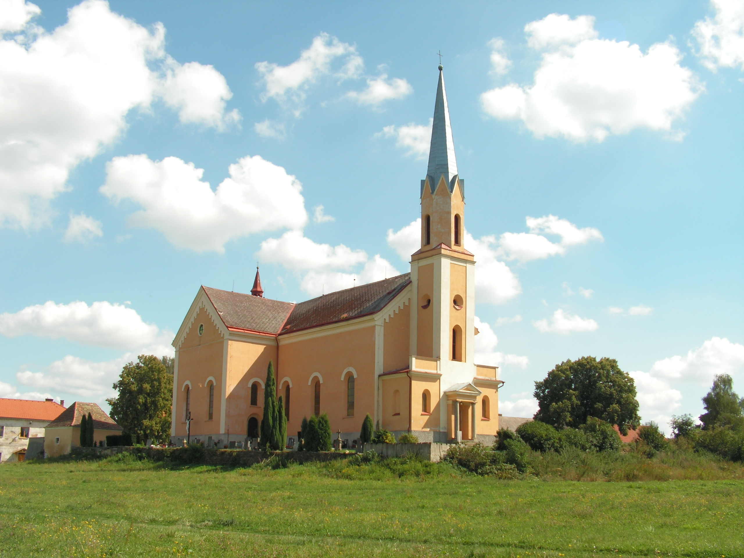 Katolický kostel Narození svatého Jana Křtitele ve Zbýšově.